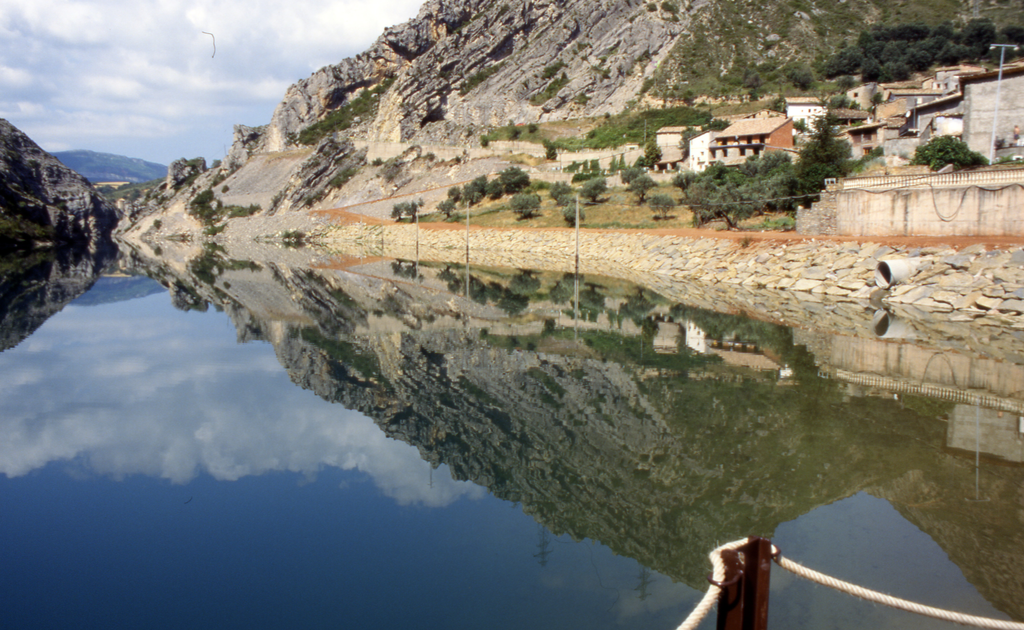 Pyrenäen Ansicht